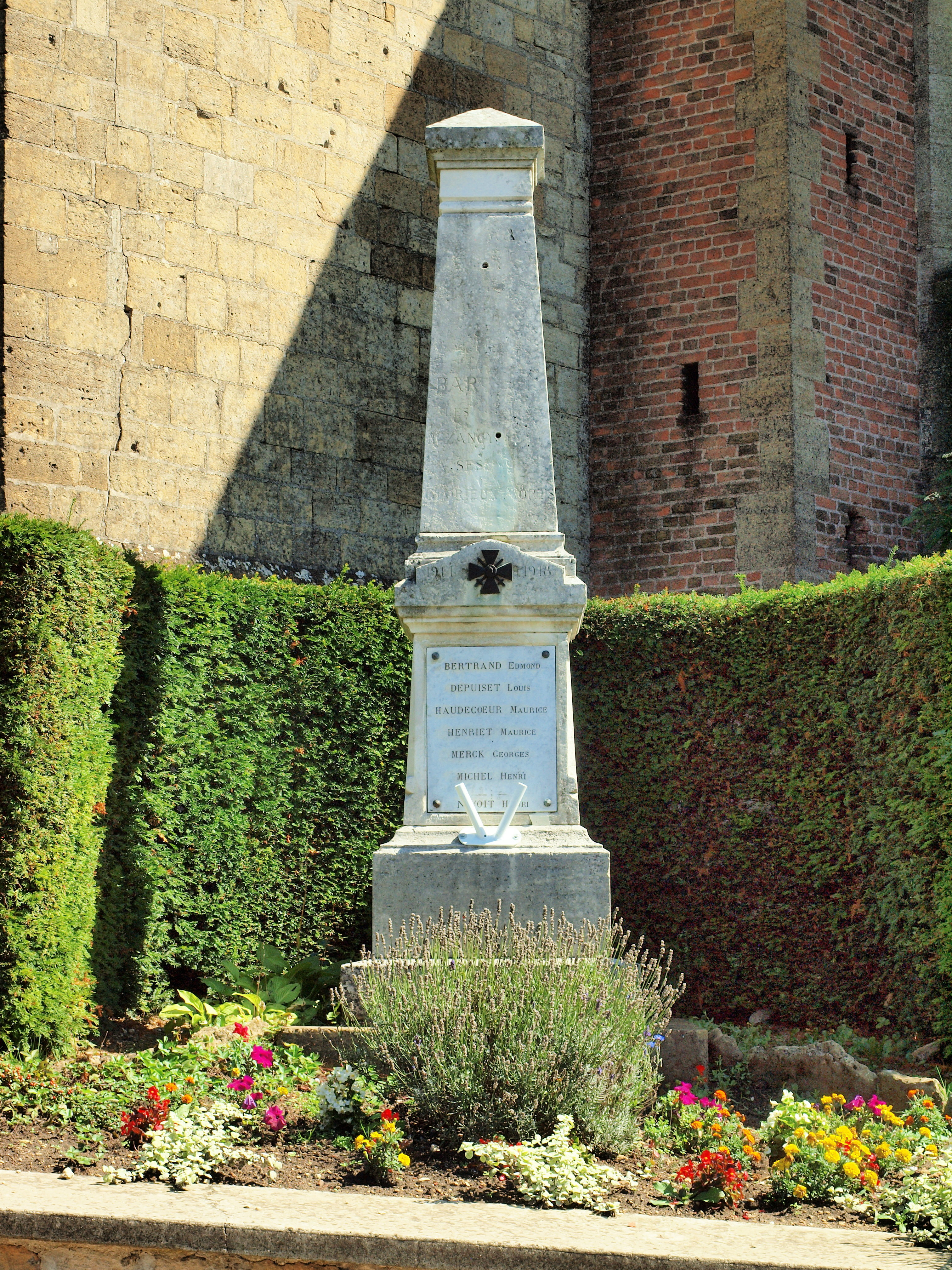 Bar-lès-Buzancy (Ardennes, France)